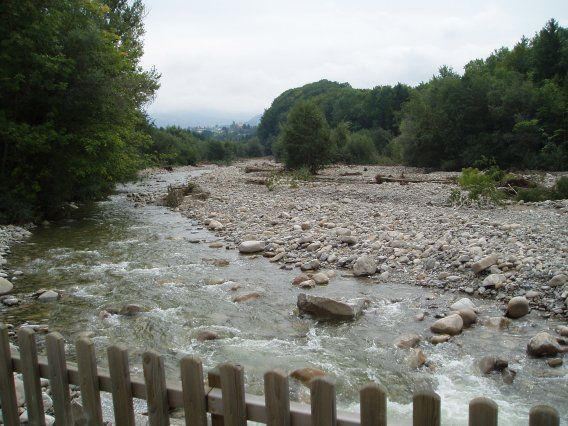 Ärgera mit normalem Wasserstand Aufgenommen: Sommer 2005